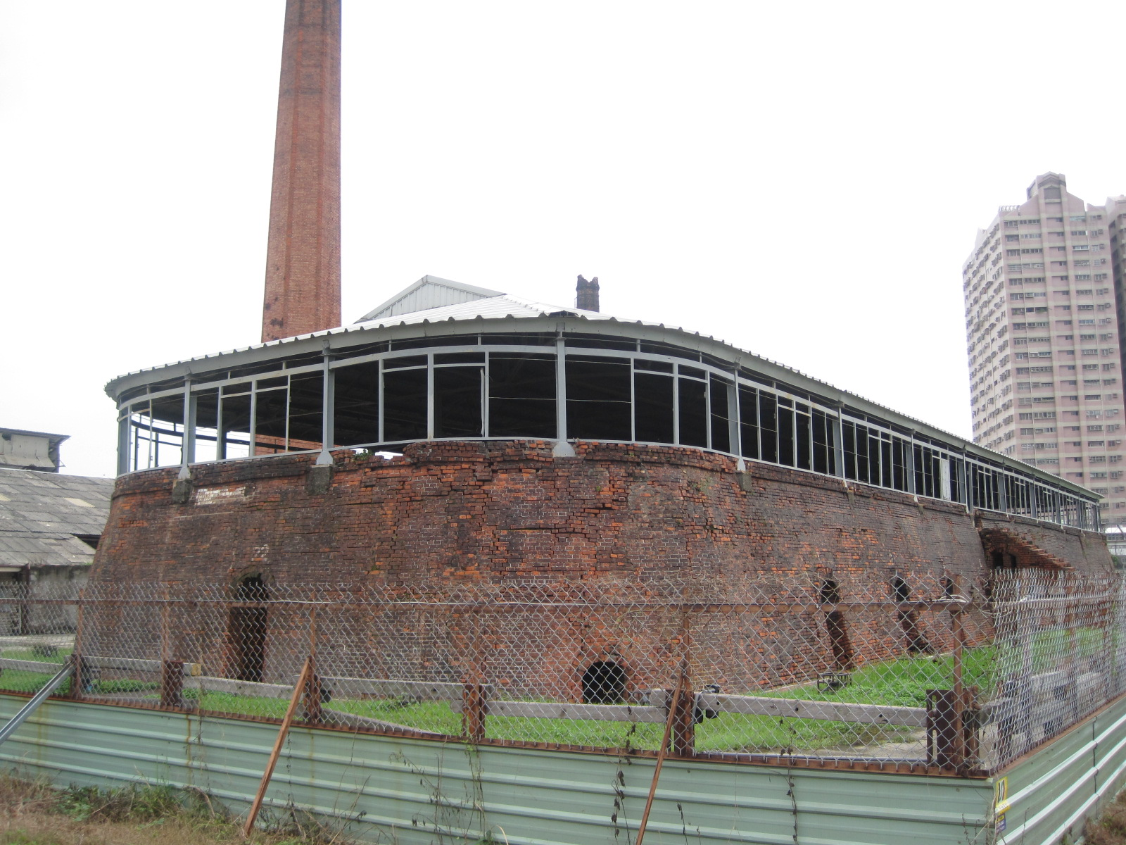 高雄市國定古蹟「中都唐榮磚窯廠」。